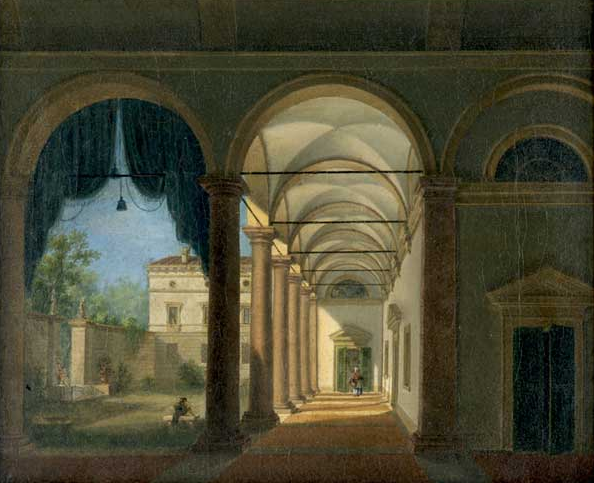 Porticato rinascimentale, olio su tela, Gorizia, Palazzo Coronini Cronberg